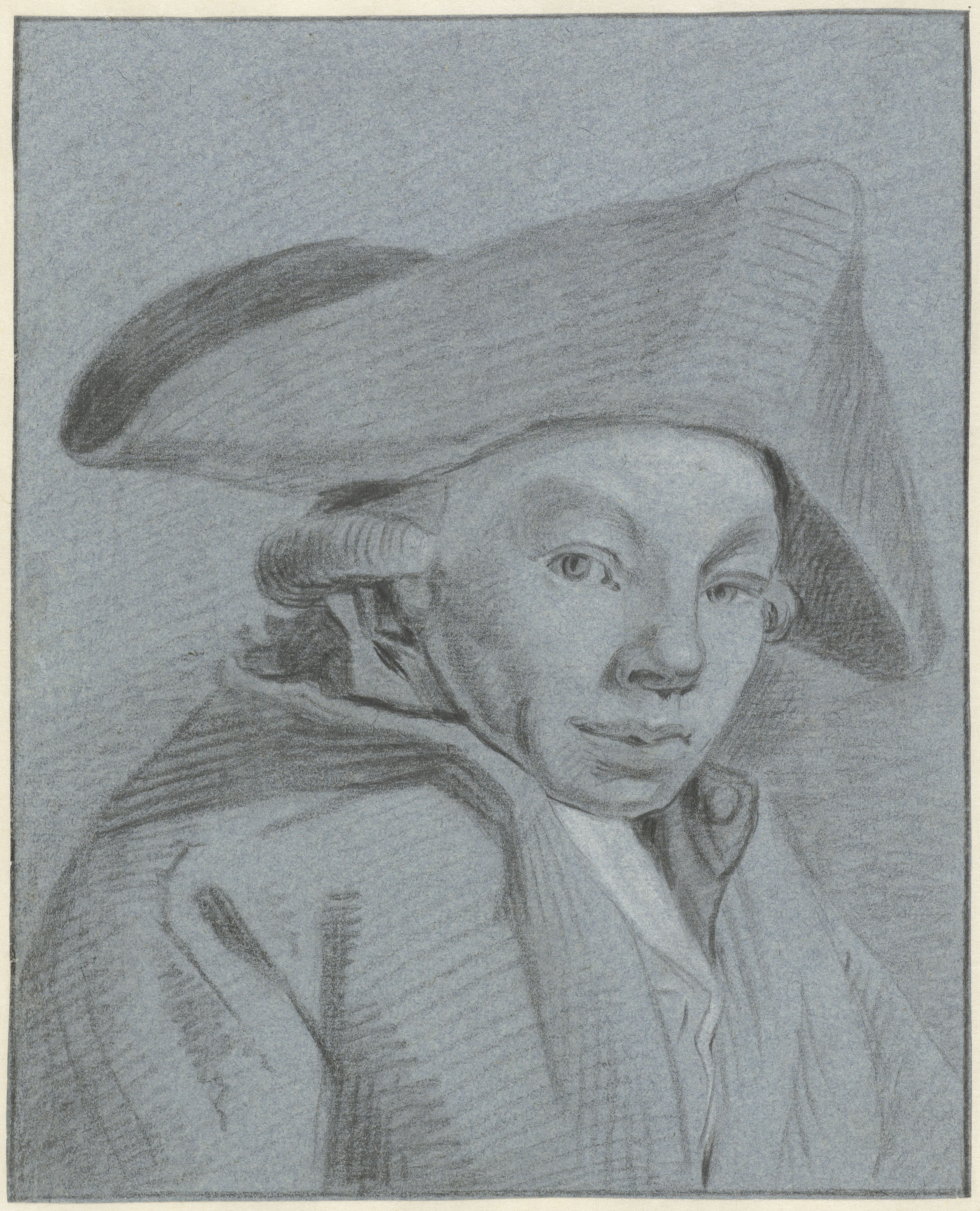 IdentificatieTitel(s): Portret van Jan Evert GraveObjecttype: tekening Objectnummer: RP-T-FM-356VervaardigingVervaardiger: tekenaar: Jan Evert GraveDatering: 1769 - 1805Fysieke kenmerken: zwart en wit krijt op blauw papierMateriaal: papier krijt Afmetingen: h 237 mm × b 193 mmOnderwerpWat: portrait, self-portrait of artistportrait, self-portrait of draughtsmanhistorical person (GRAVE, JAN EVERT) - historical person (GRAVE, JAN EVERT) portrayed aloneWie: Jan Evert GraveVerwerving en rechtenCredit line: Bruikleen van de gemeente AmsterdamVerwerving: bruikleen 1889Copyright: Publiek domein